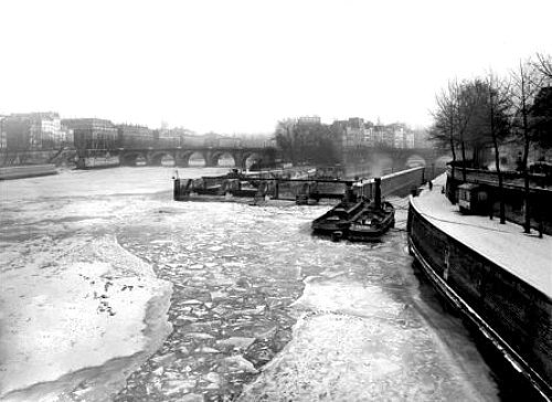 La Seine glacée en hiver à Paris.